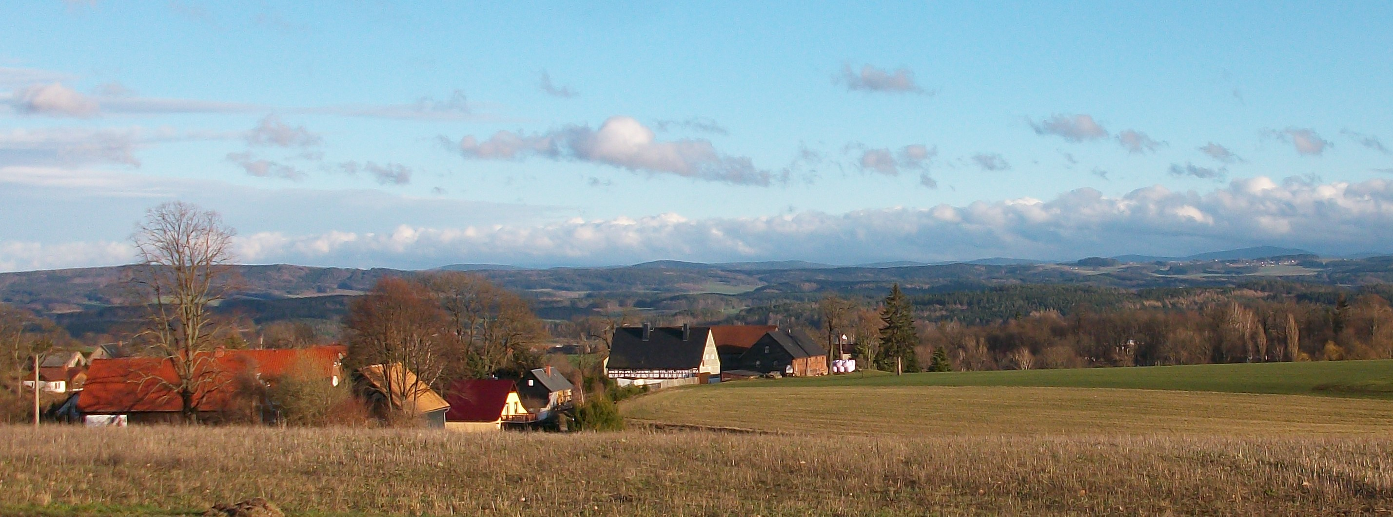 Ortsansicht von Voigtsgrün mit Blick ins Westerzgebirge